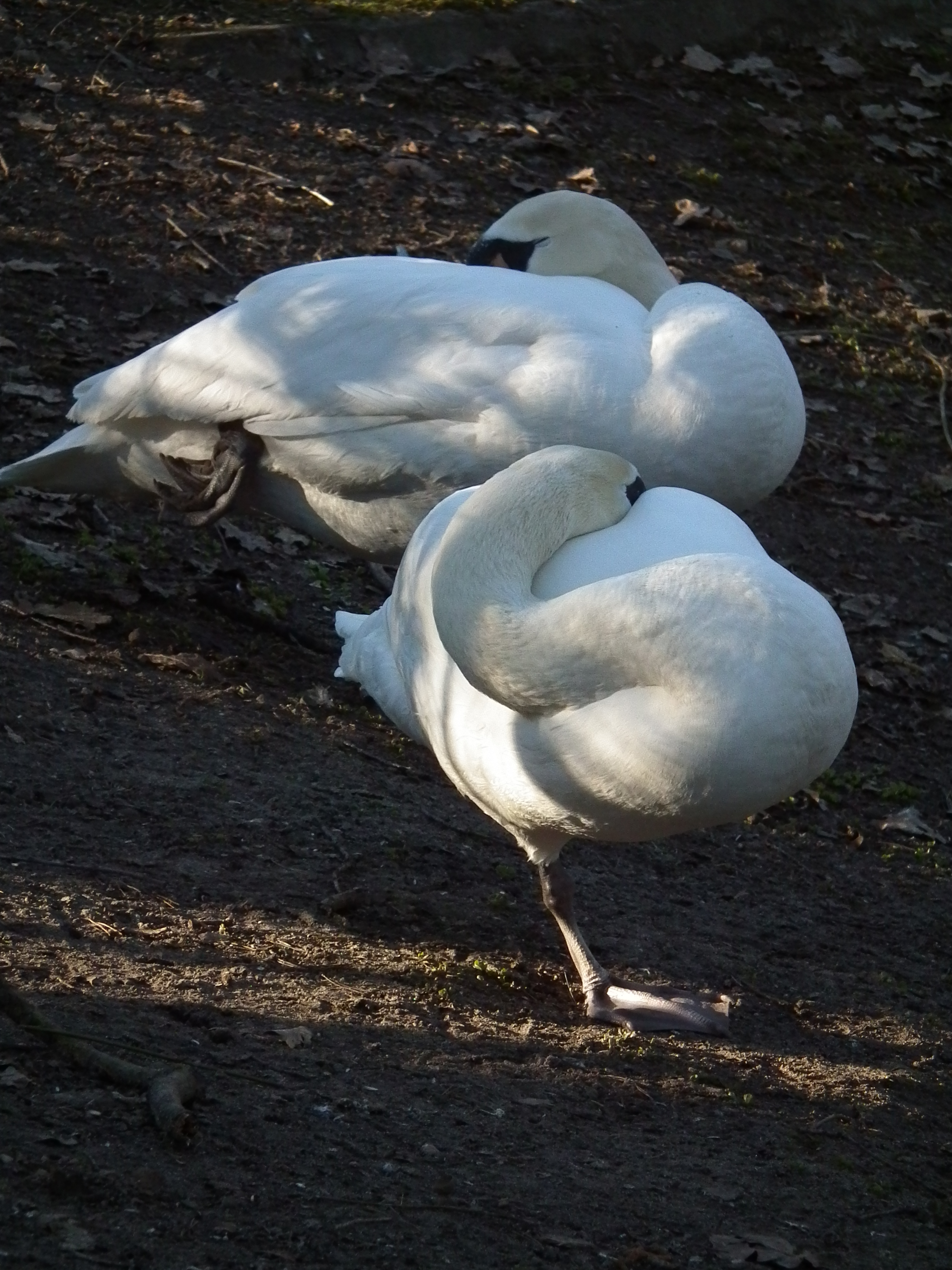 Schlafende Höckerschwäne (Cygnus olor), fotografiert im Vogelpark Birkengarten in Lorsch (Hessen, Deutschland)